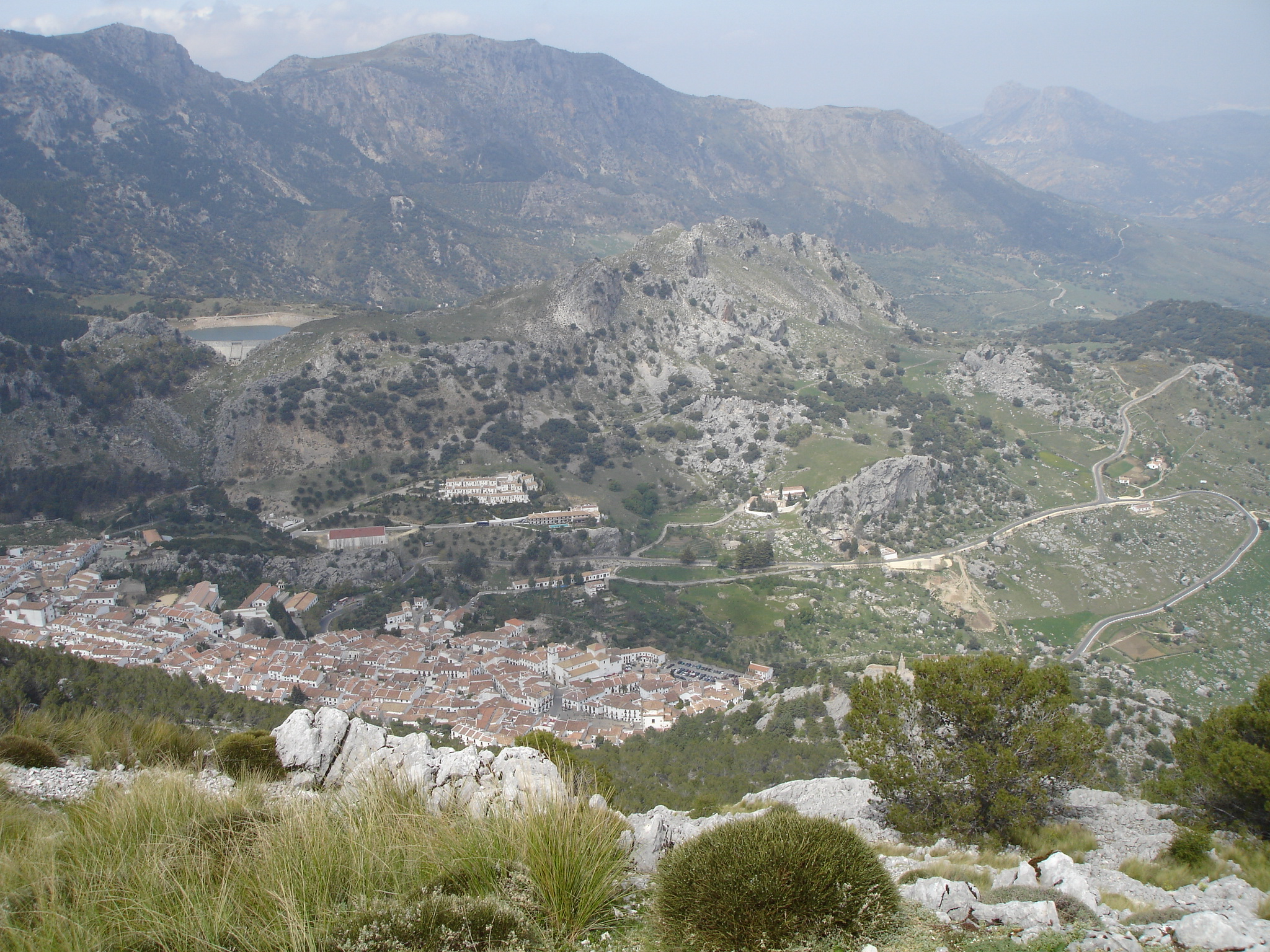 Grazalema desde la Sierra del Endrinal, cerca de la Cueva de las dos puertas